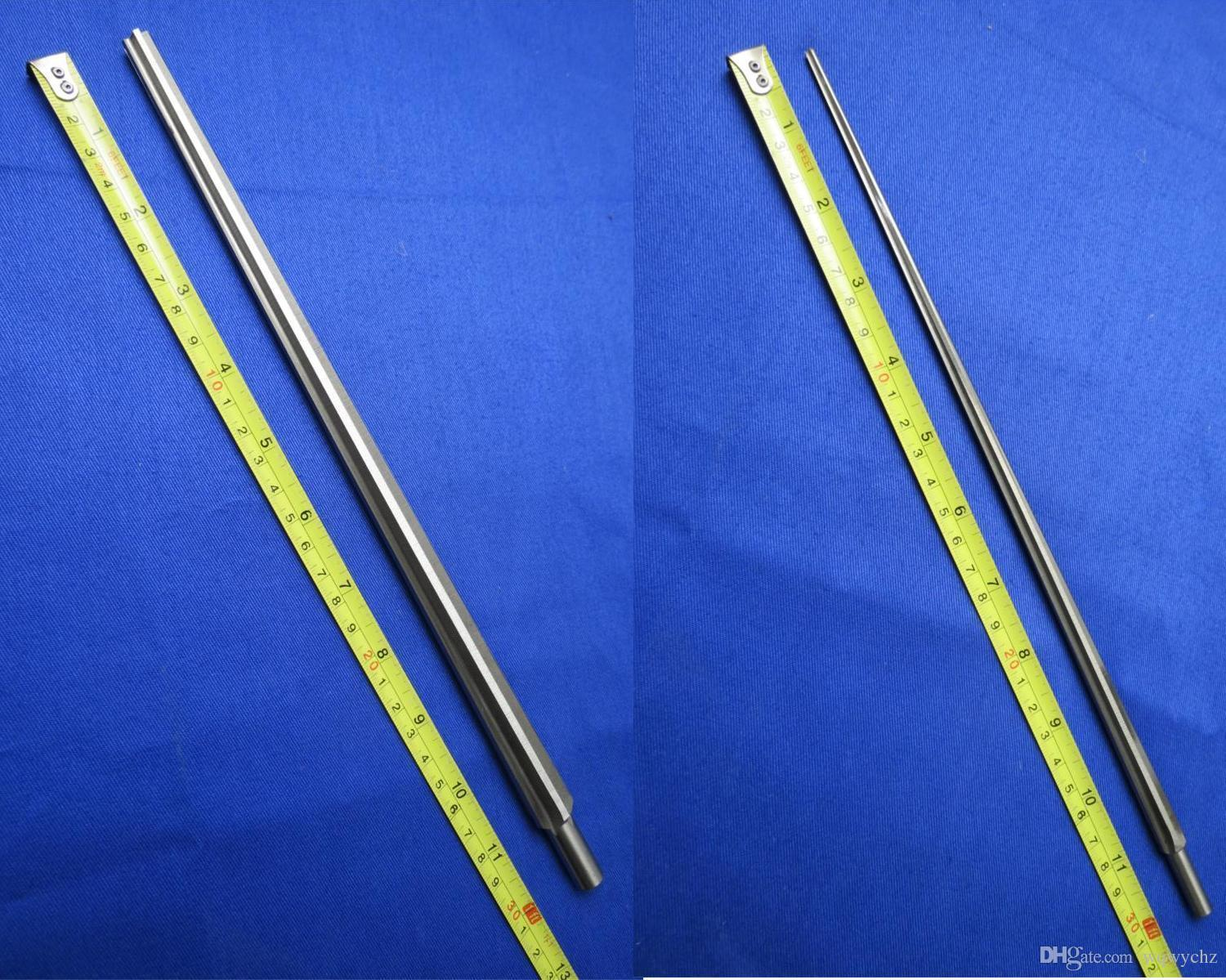 Reemer for oboe